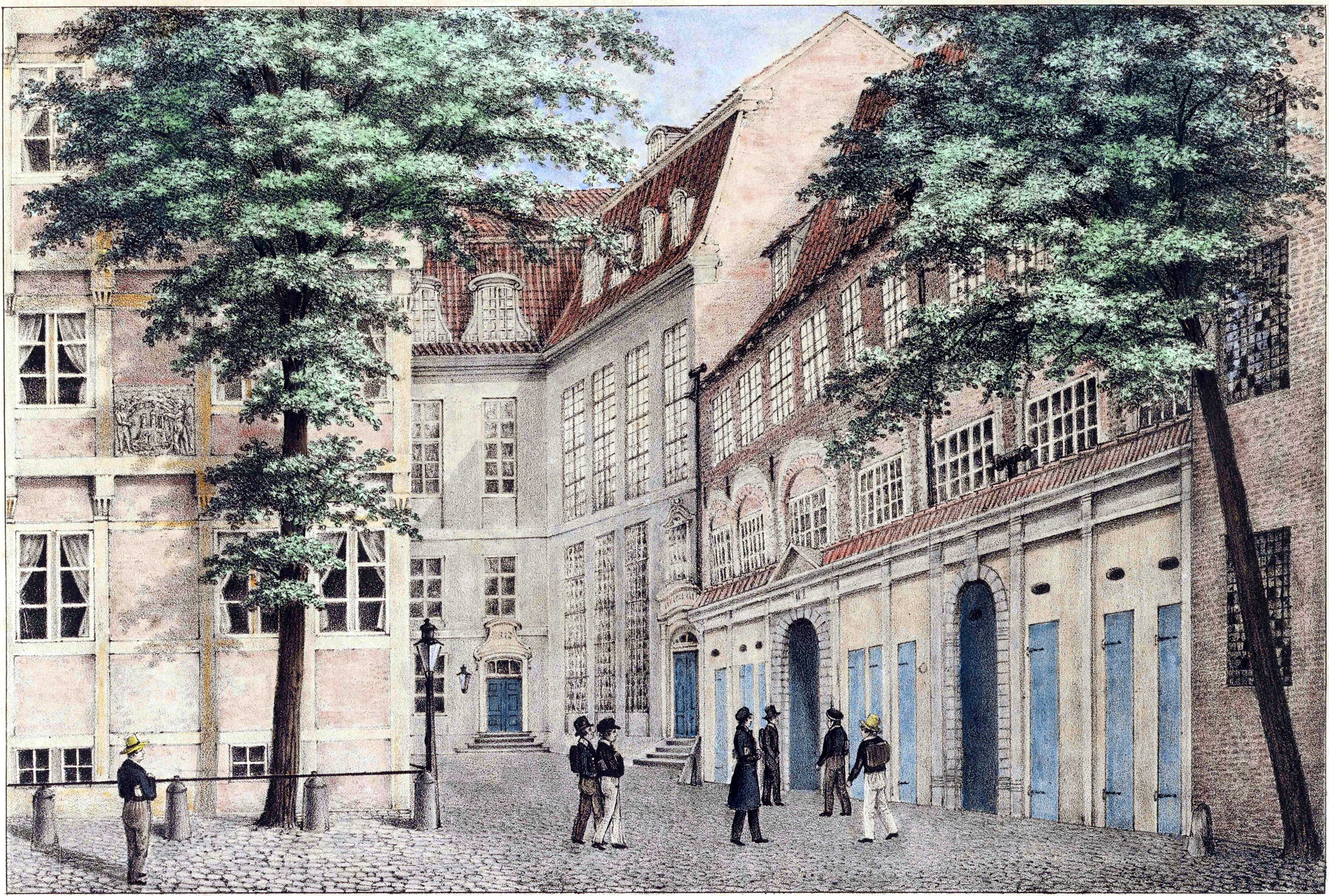 Die Stadtbibliothek, das Gymnasium und das Johanneum in Hamburg, gezeichnet von Christoffer Suhr, Litho von Peter Suhr (Altbau im alten St. Johanniskloster)